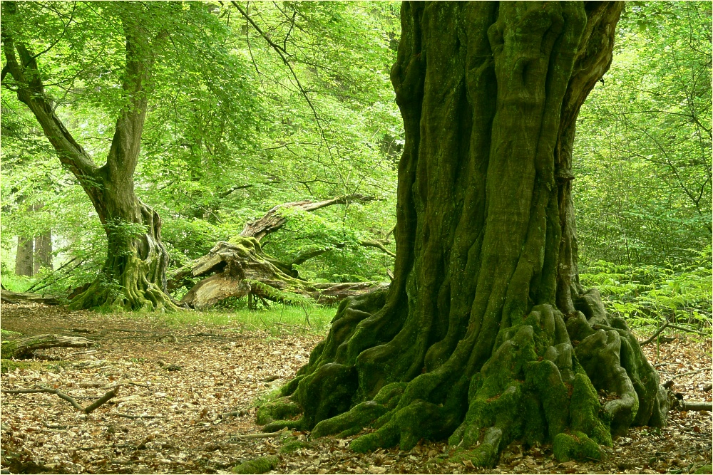 alte Hainbuchen im Urwald Sababurg, Reinhardswald